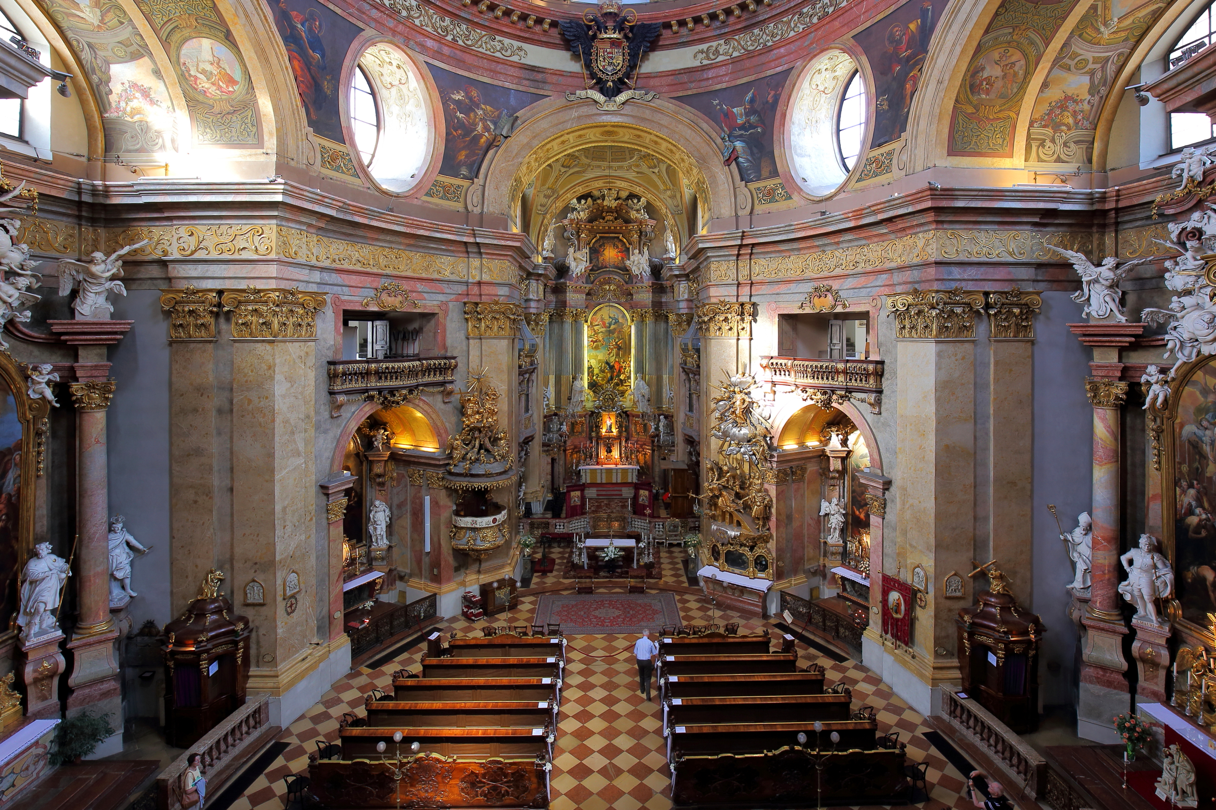 Innenansicht der Rektoratskirche St. Peter in der Bundeshauptstadt Wien. Die Kirche, erster barocker Kuppelbau Wiens, wurde ab 1701 von der Laiengemeinschaft Der Bruderschaft der Allerheiligsten Dreifaltigkeit errichtet (ab 1703 nach Plänen von Johann Lucas von Hildebrandt) und 1733 vollendet sowie geweiht. Die barocke Ausstattung stammt von bedeutenden Künstlern wie Matthias Steinl, Johann Michael Rottmayr und Martino Altomonte.